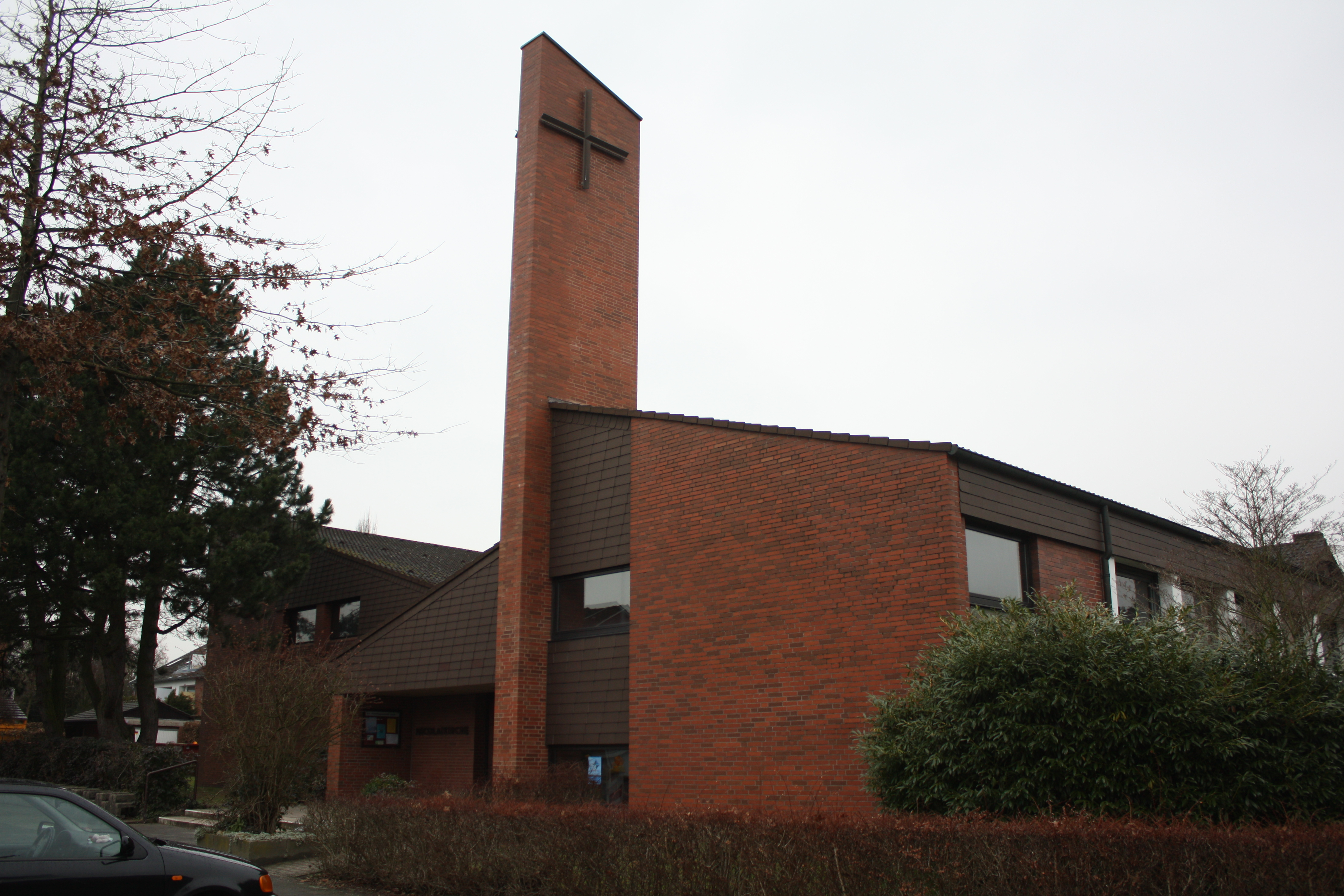 evangelische Nicolaikirche in Münster-Roxel